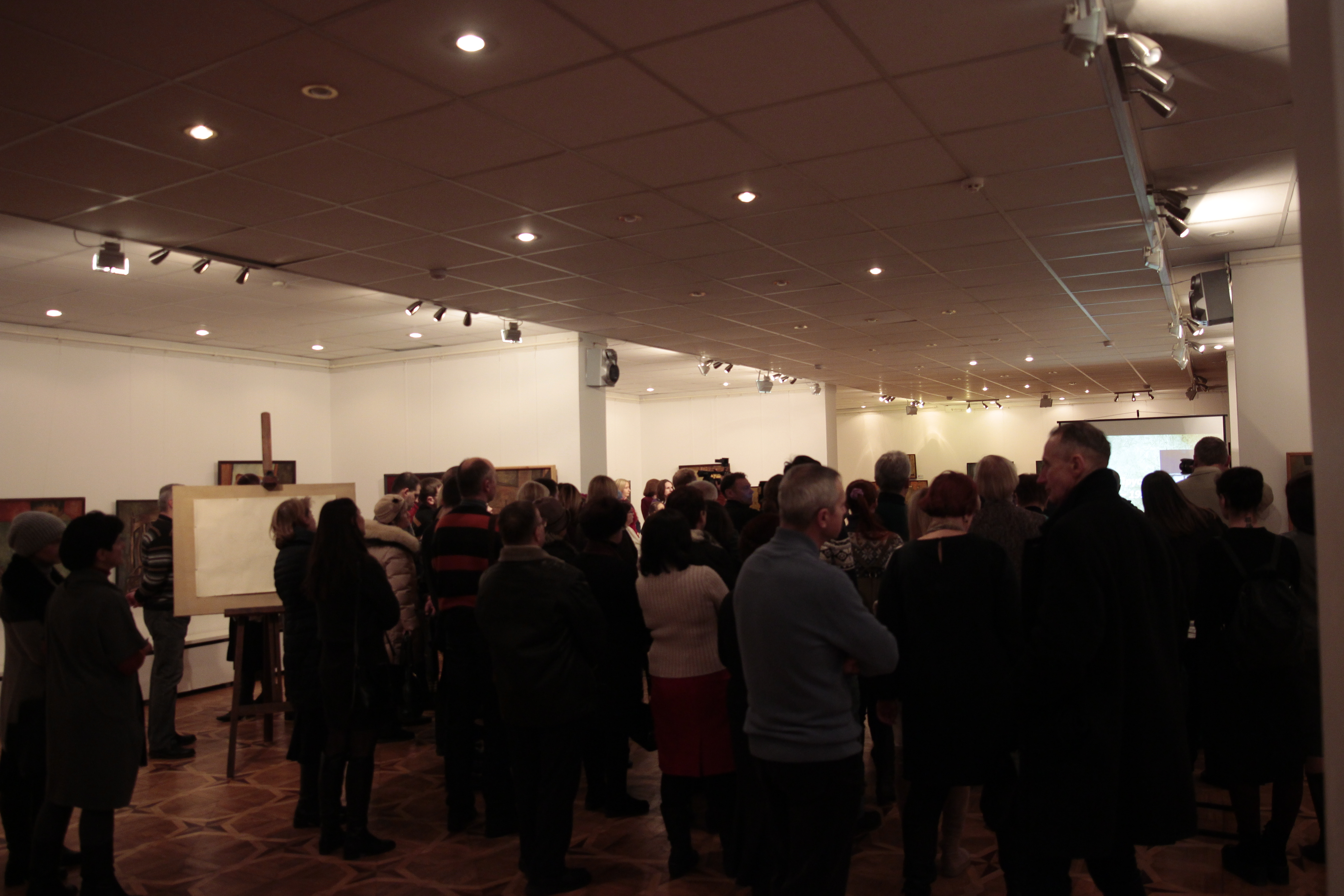 Открытие выставки Месяц Ай